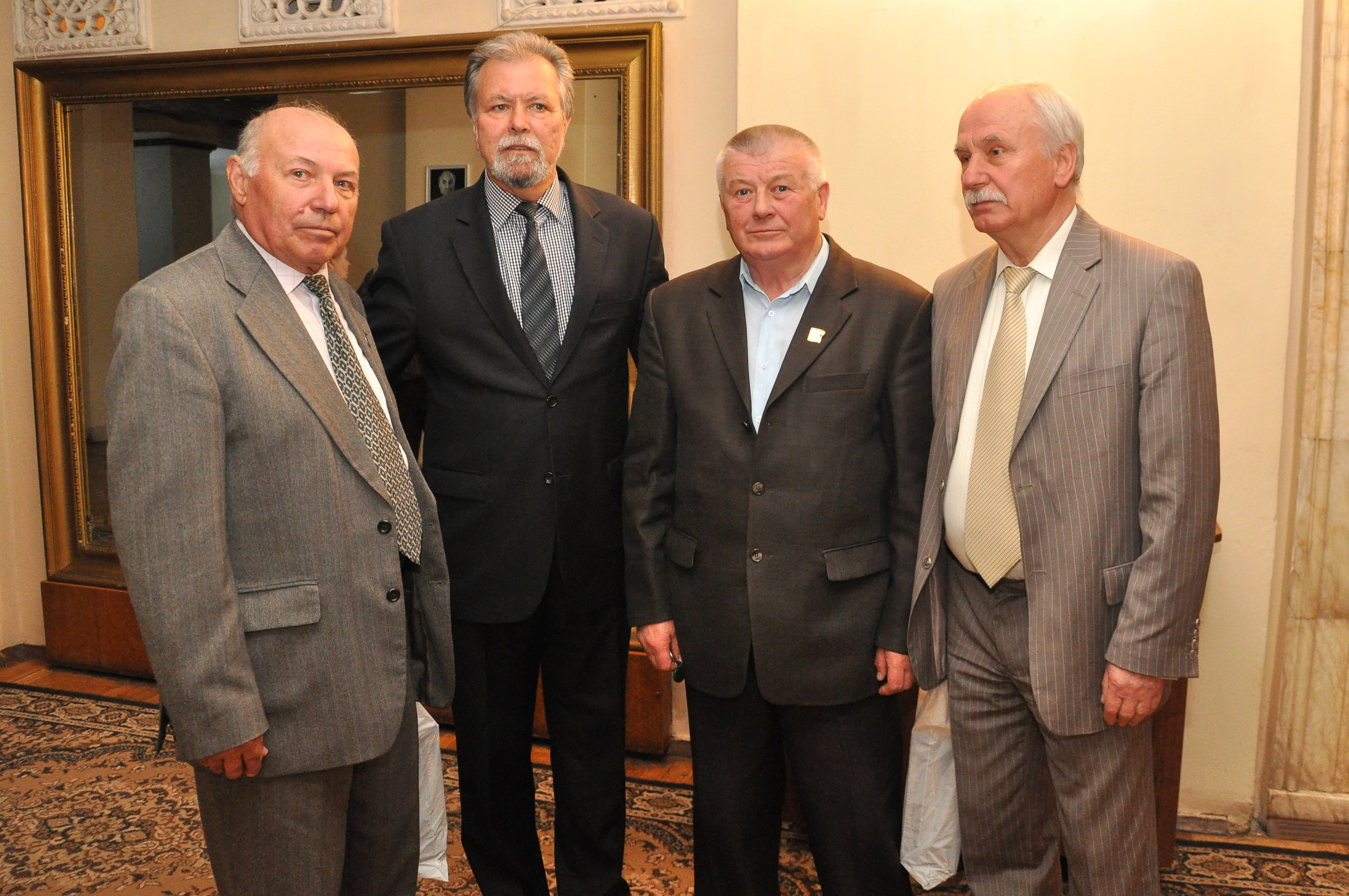 Михайло Ониськів, Григорій Шергей, Євген Безкоровайний та Ігор Дуда після презентації книги «Тернопільщина. Історія міст і сіл», яка відбулася 15 травня 2015 року в Тернопільському академічному обласному драматичному театрі ім. Т. Г. Шевченка.